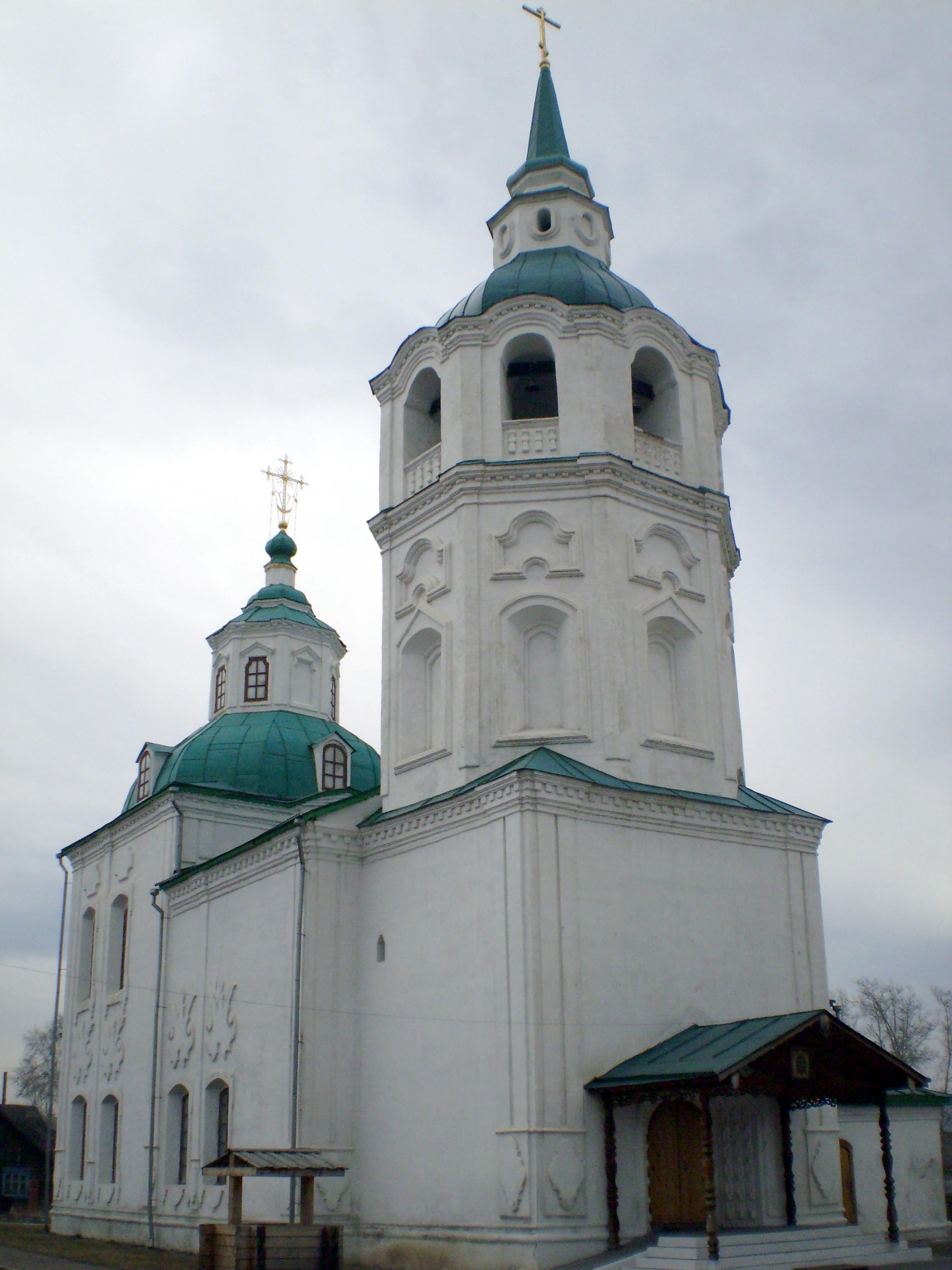 Спасская церковь в Турунтаево. Прибайкальский район Бурятии.